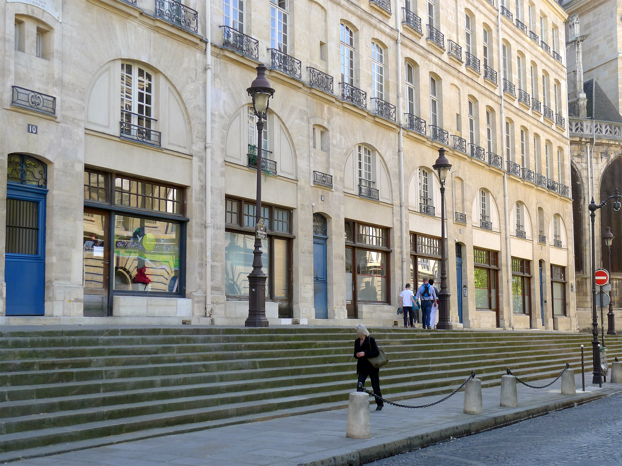 Rue François-Miron (escalier) - Paris IV